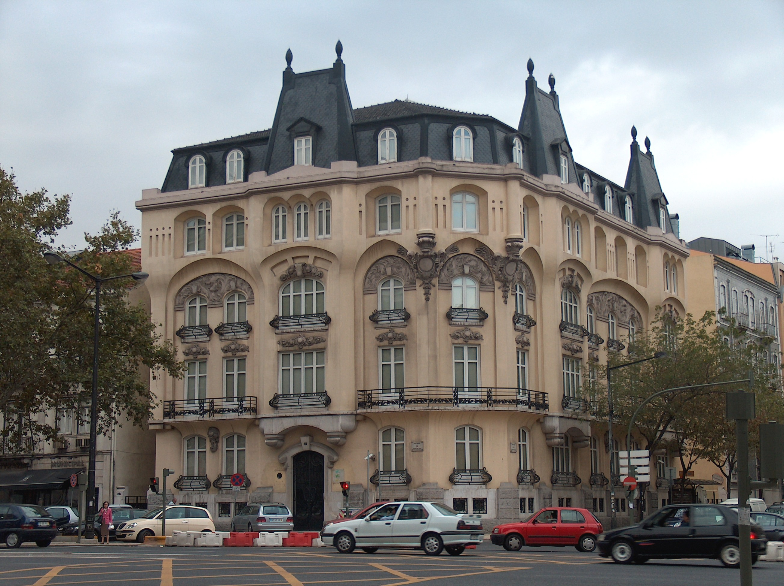 Edifício na Avenida da República, nº 23 (Prédio de Gaveto entre a Avenida da República, nº. 23 e a Avenida João Crisóstomo, nº 19)